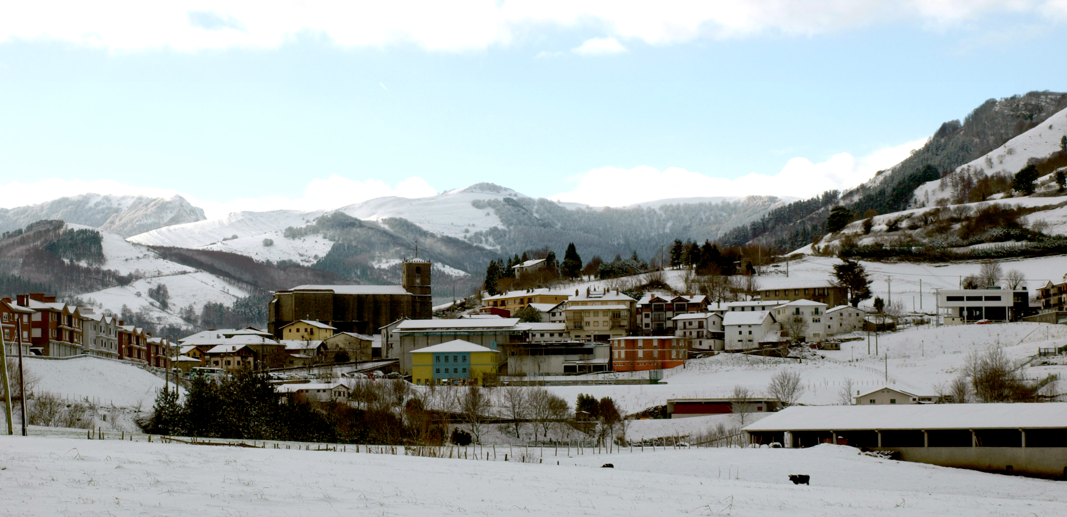 Vista de Aia bajo una fuerte nevada el 10 de enero de 2010. Al fondo el macizo de Ernio